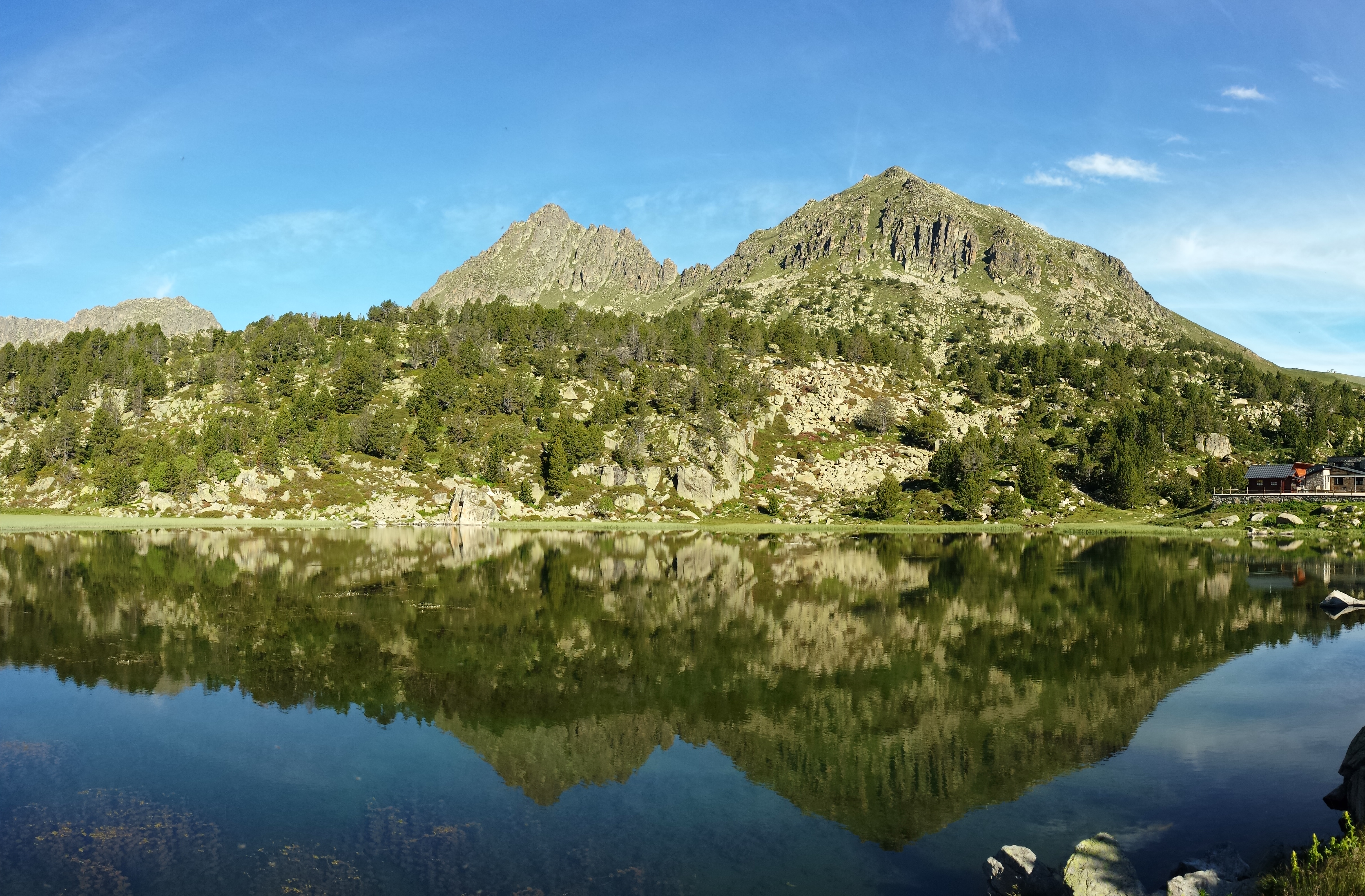 Estany Primer (Encamp) This is a a photo of a lake or pond in Andorra with id: IEA-BE-171